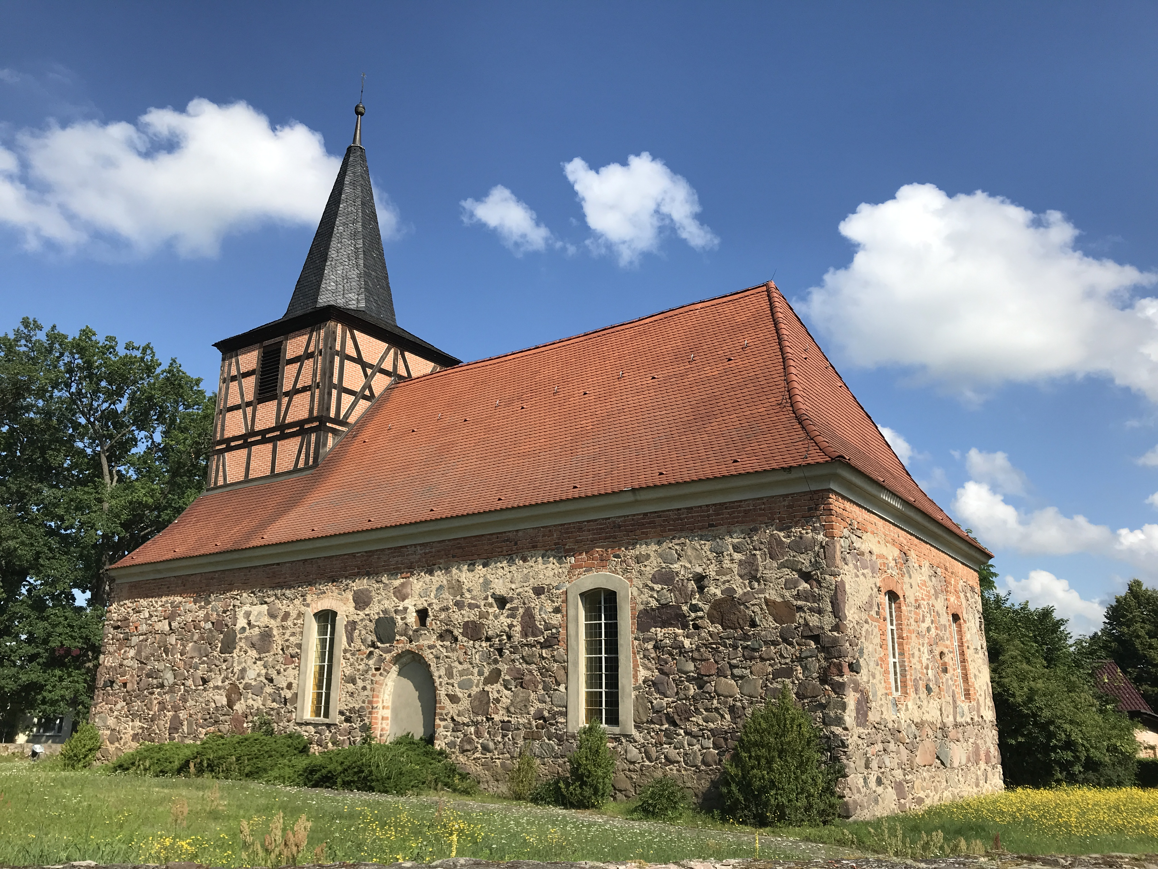 Die Dorfkirche Merz der Gemeinde Ragow-Merz im Landkreis Oder-Spree ist eine spätgotische Feldsteinkirche. Im Innern steht unter anderem ein spätbarocker Kanzelaltar mit einem Korb aus der ersten Hälfte des 17. Jahrhunderts.